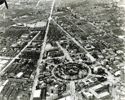 摄于1945年10月1日的天津中心公园